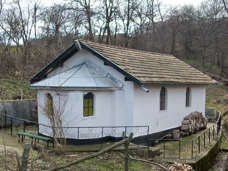 Село Звезда, община Попово. Параклисът, построен над лековитото аязмо в края на селото